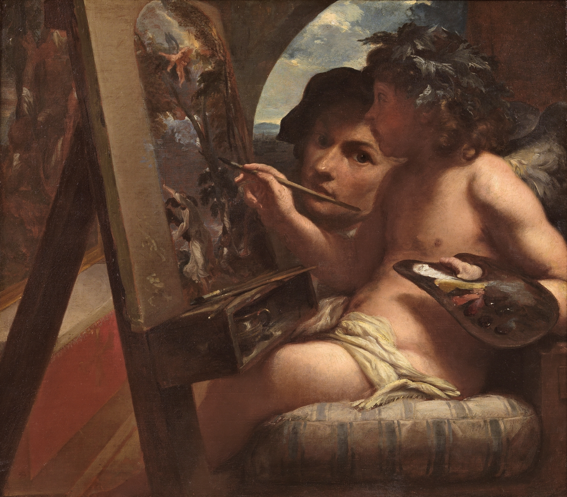 El genio de la pinturaThe Genius of Paintingtitle QS:P1476,es:"El genio de la pintura" label QS:Les,"El genio de la pintura"